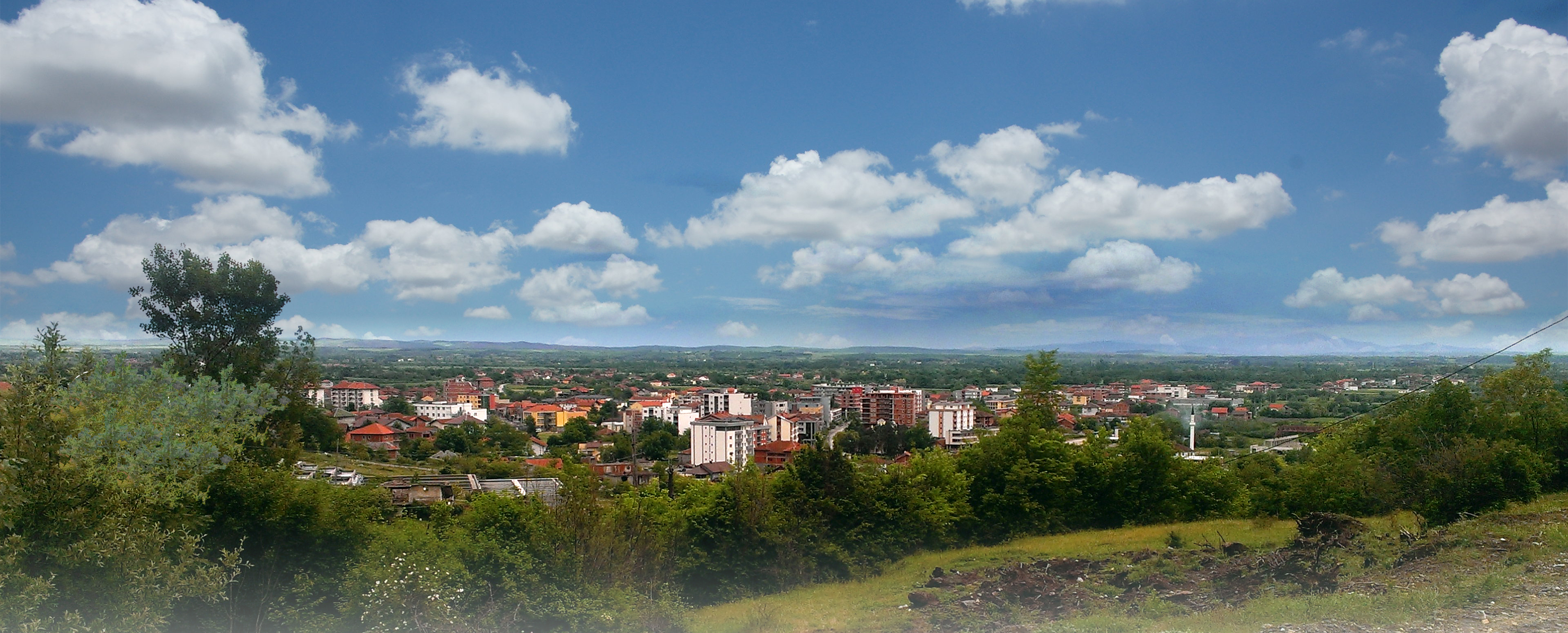 Istogu